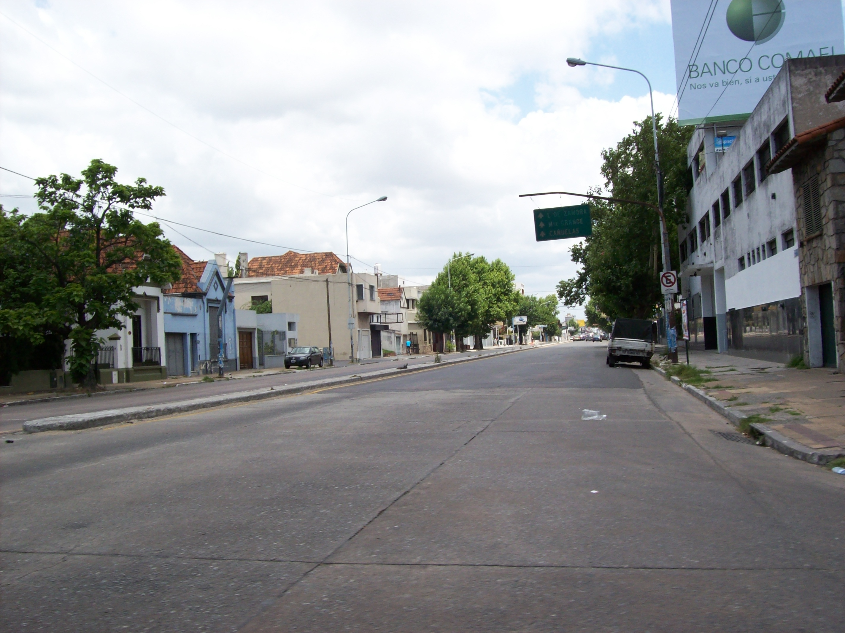 Intersección de Avenida Hipólito Yrigoyen y Larroque en Banfield, partido de Lomas de Zamora, Provincia de Buenos Aires, Argentina